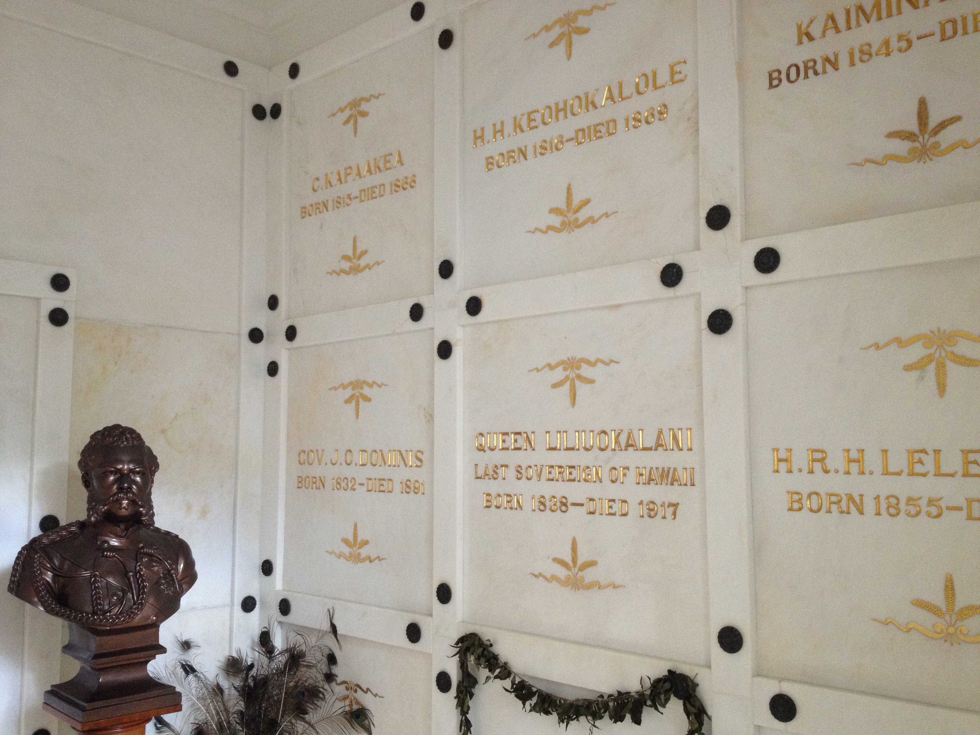 2261 Nu'uanu Avenue, Honolulu, Hawaii